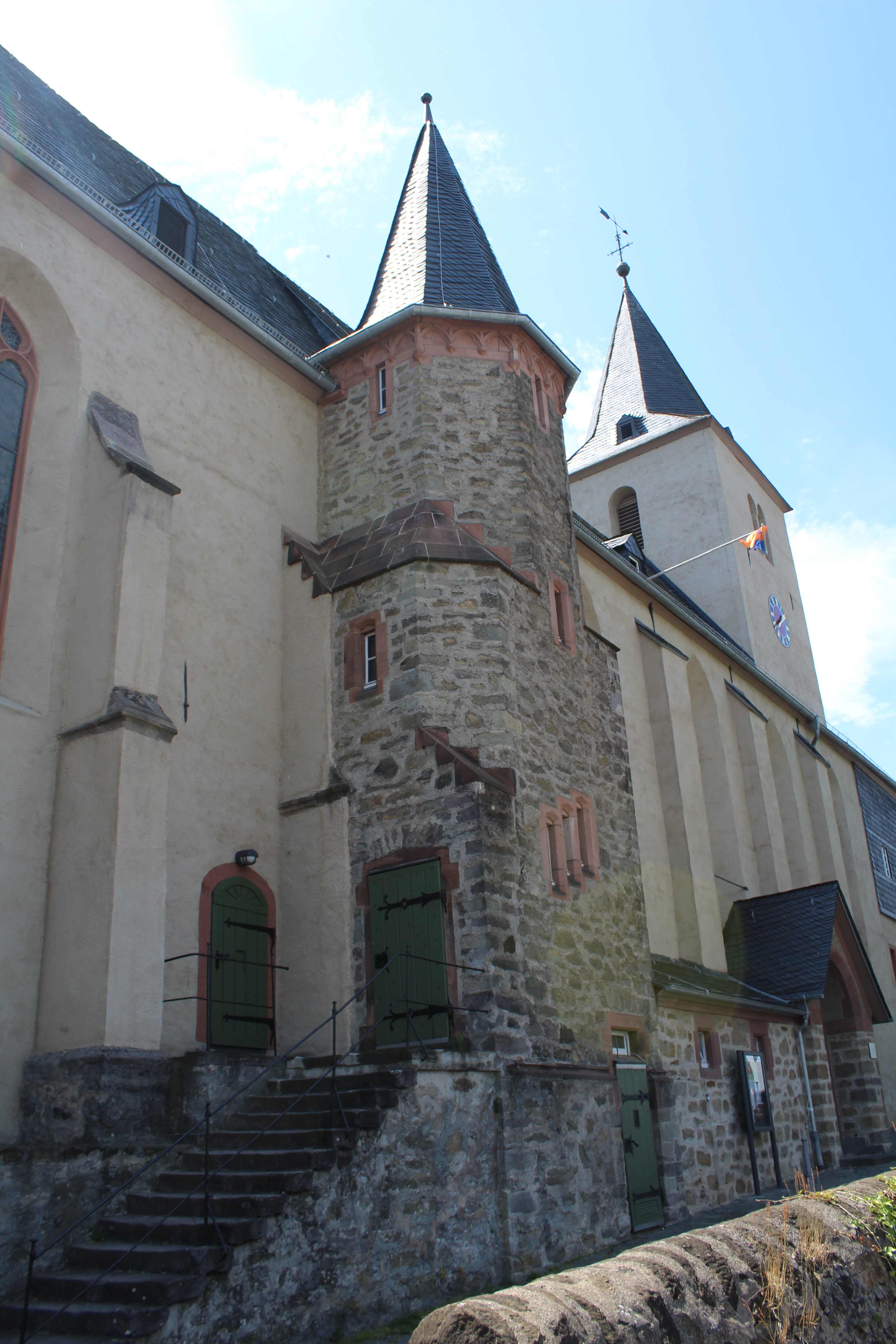 Evangelische Stadtkirche Dillenburg, Hessen, Deutschland